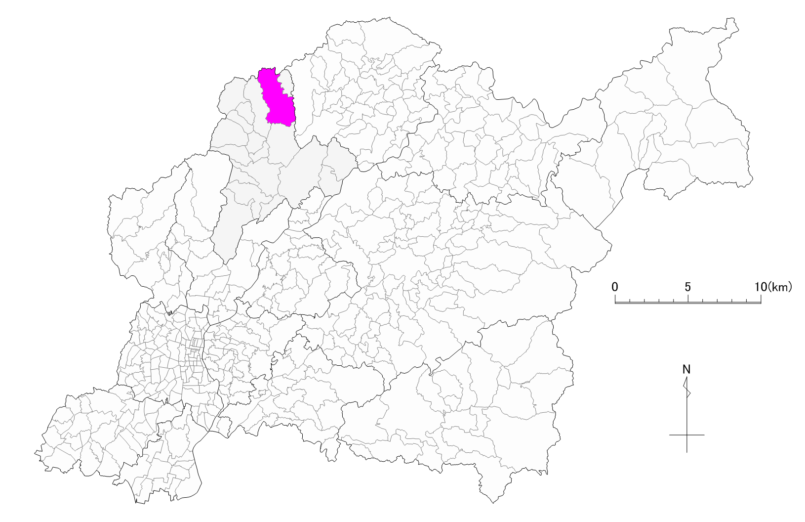 豊田市三箇町位置図